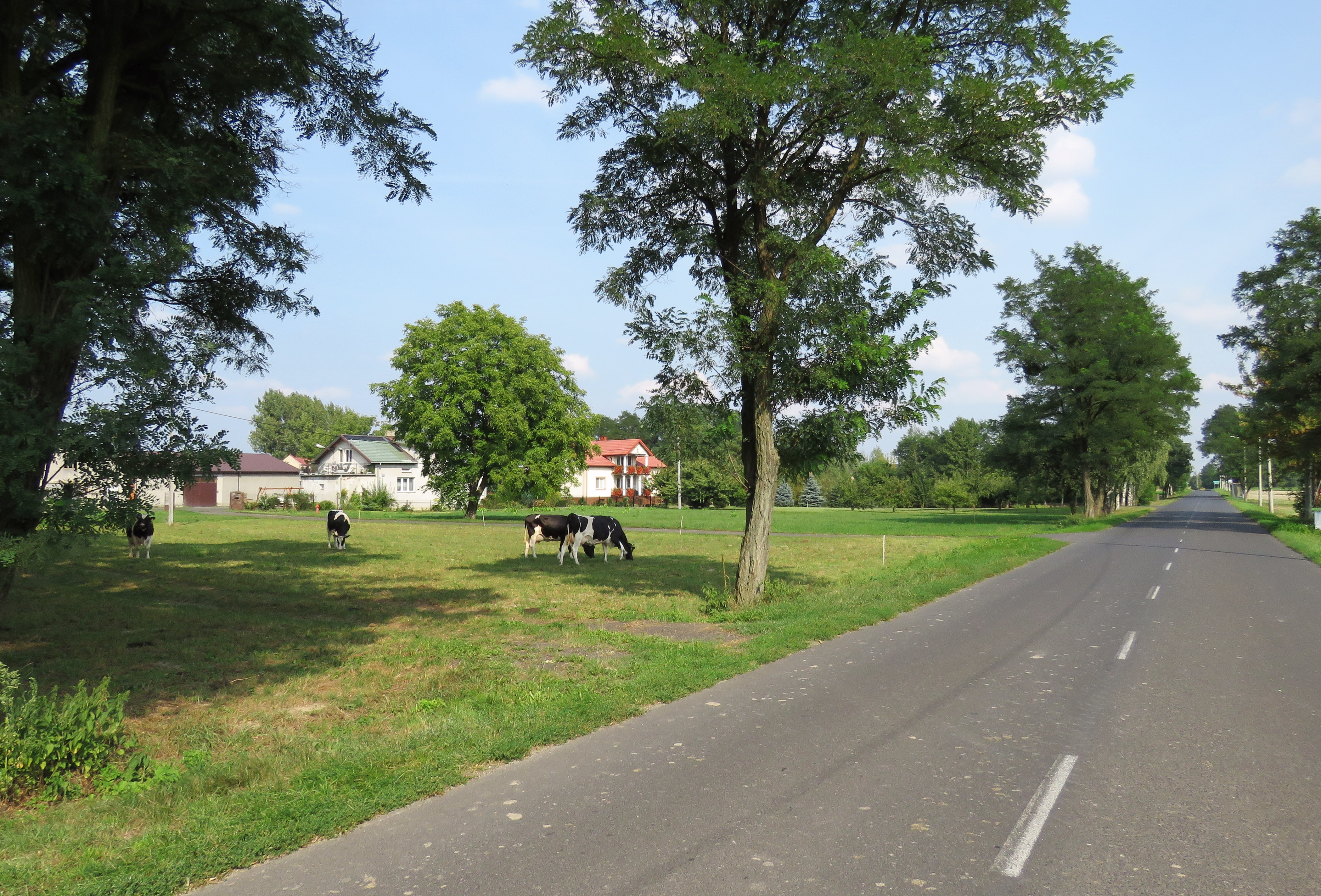 Trzciniec